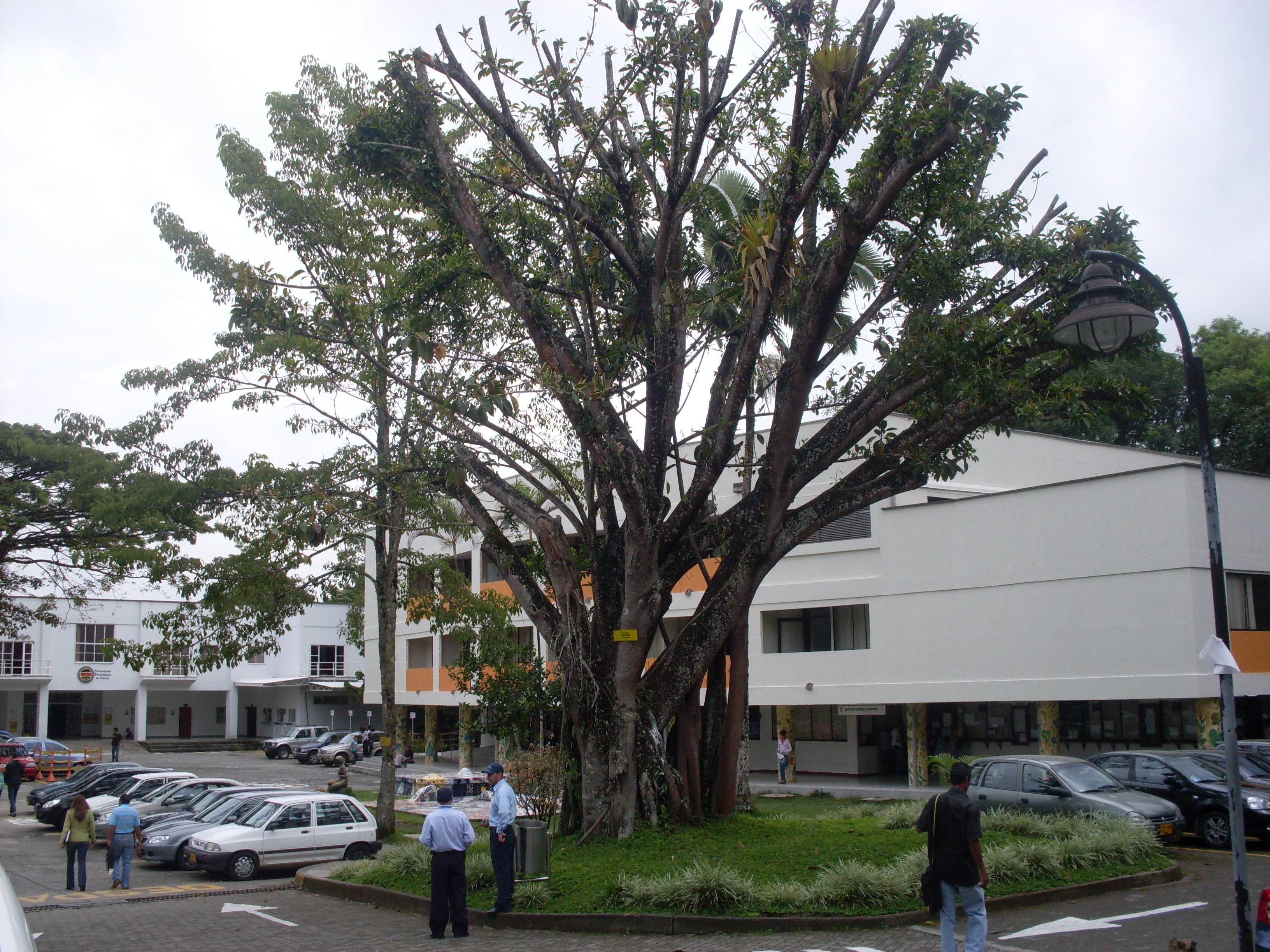 Edificio de sistemas en la Universidad Tecnológica de Pereira.